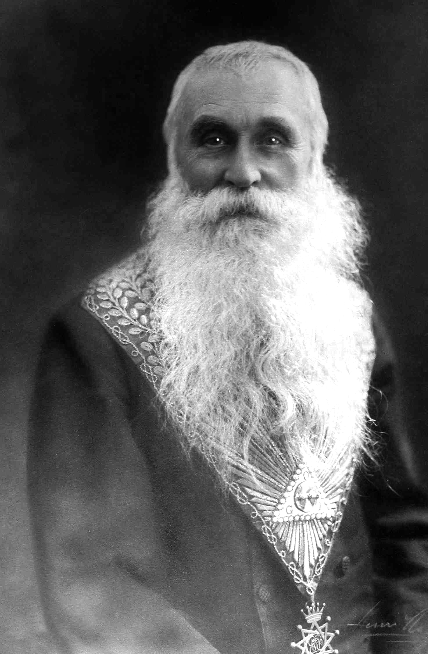 Portrait d'Arthur Groussier (1853-1957)